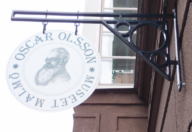 Väggskylt för Oscar OLsson Museet i Malmö, Ehrensvärdsgatan 4